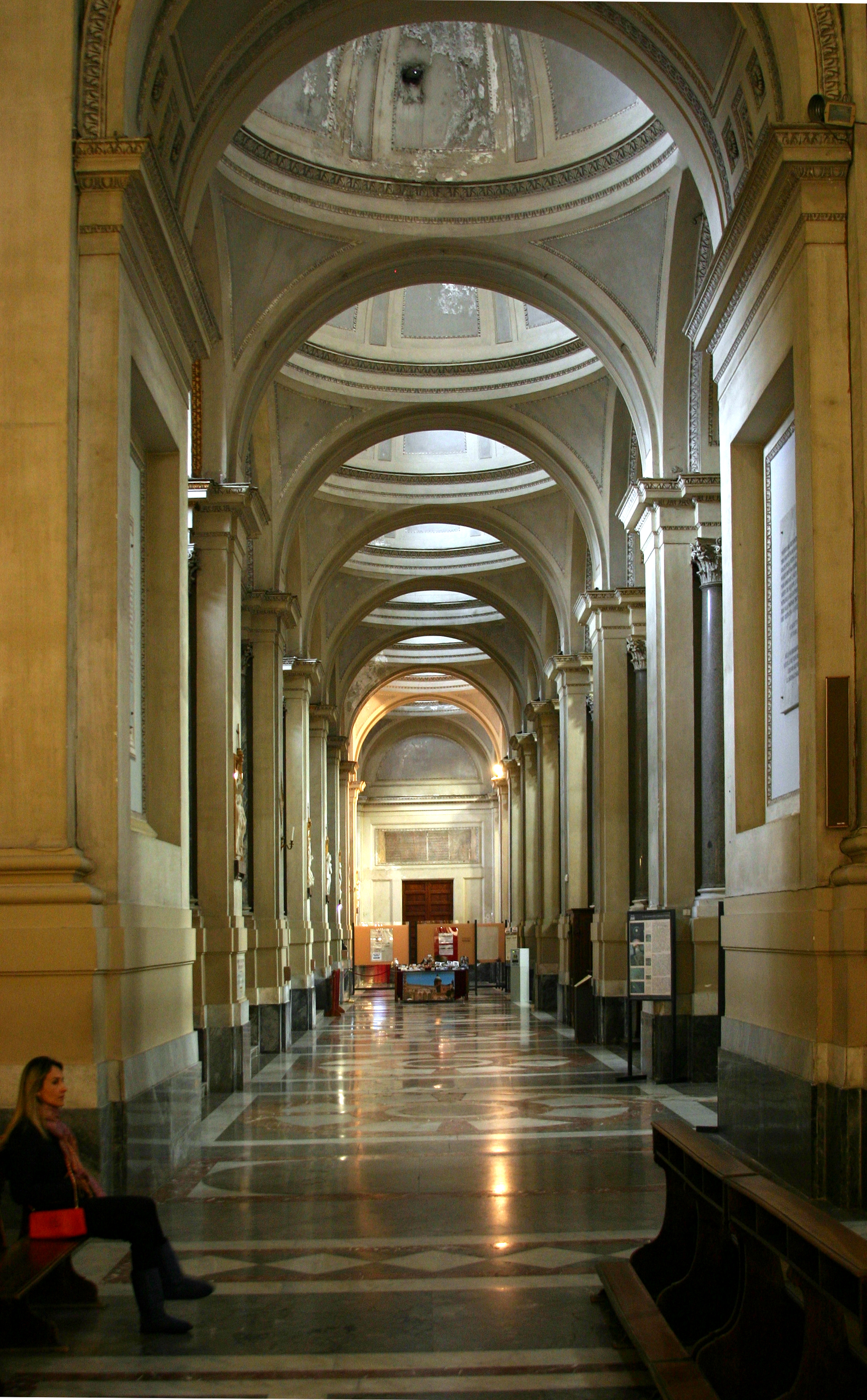 Cathedral of Palermo